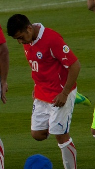 Matías Campos Toro con la camiseta de la Selección Chilena, en un encuentro ante la Selección de Uruguay